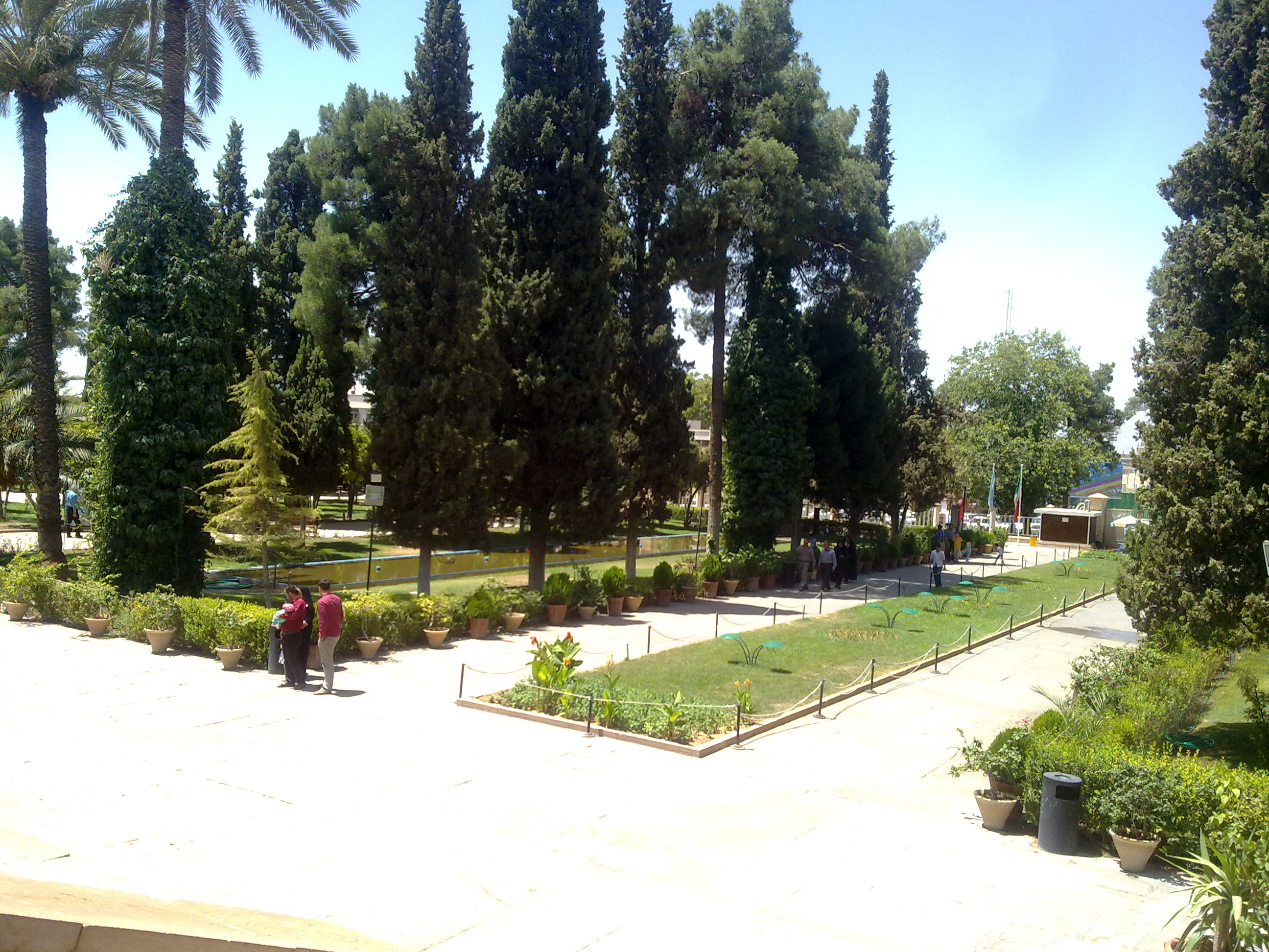 حافظیه